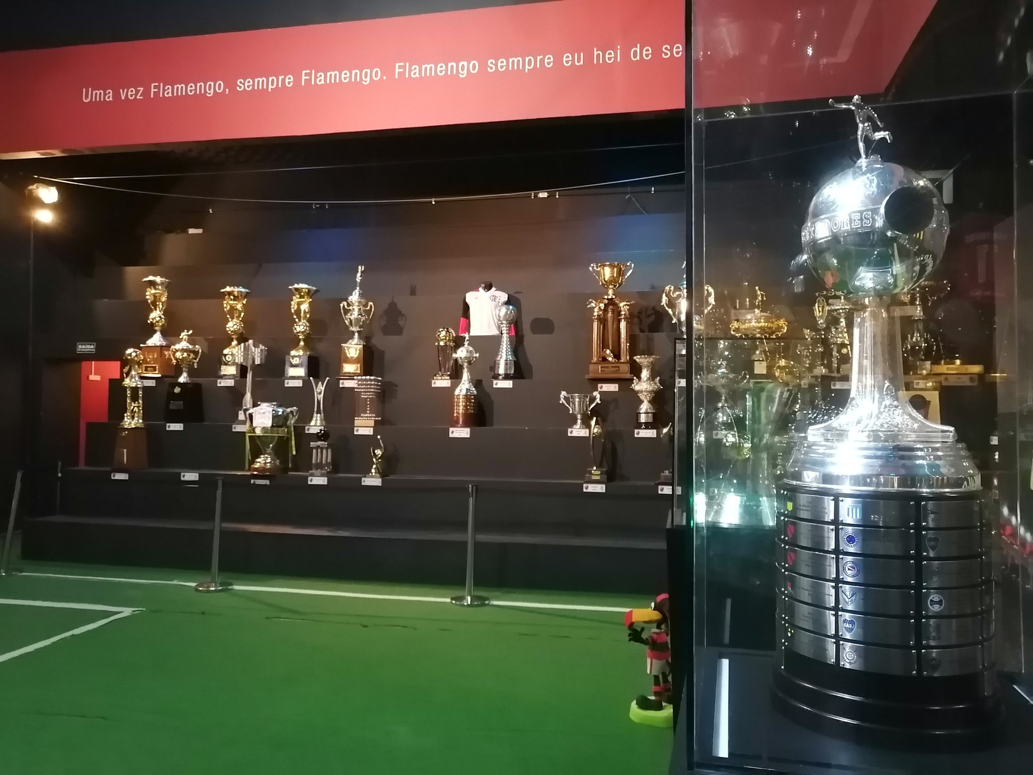 Sala de Trofeu do Flamengo em 2020